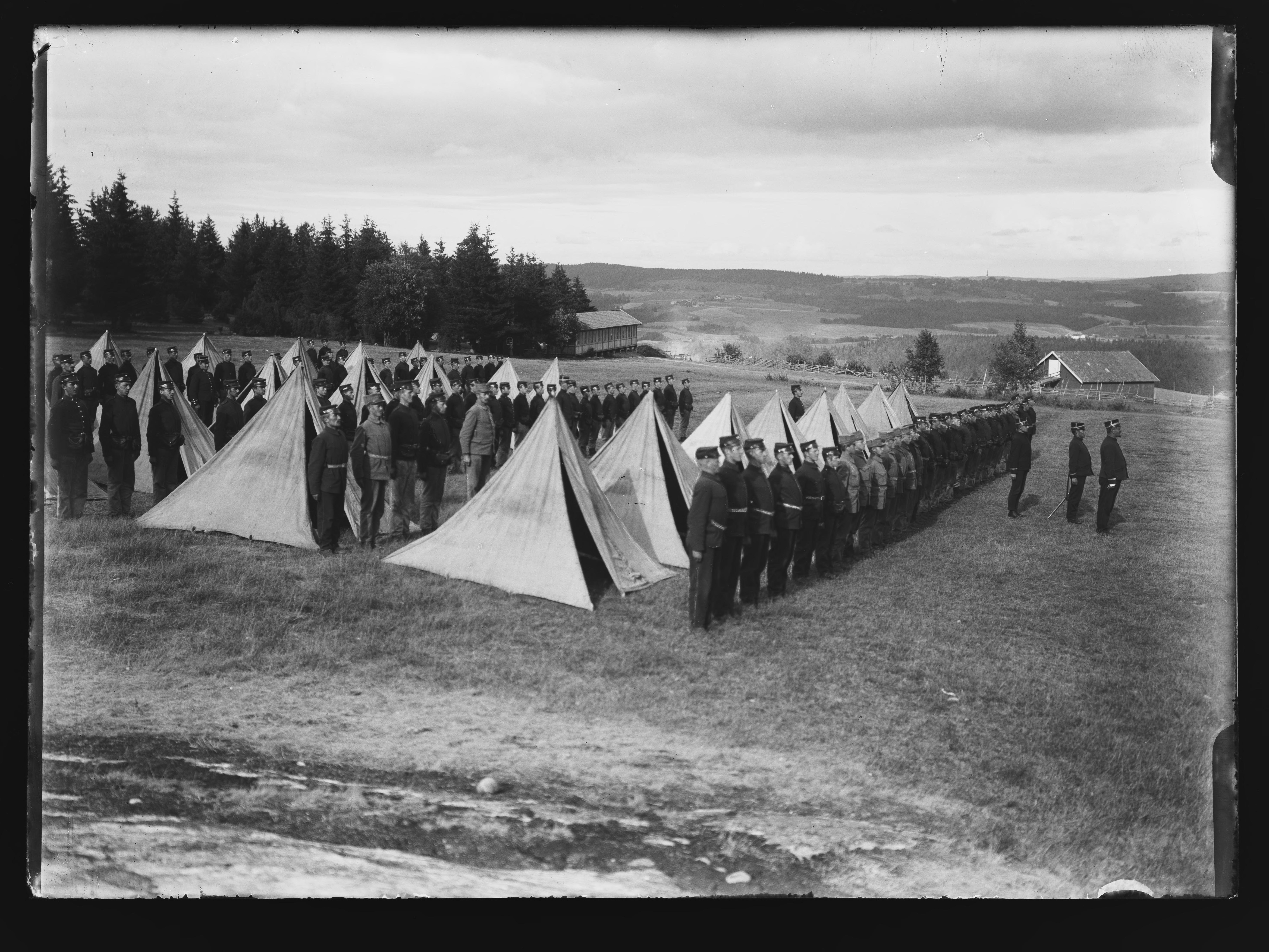 Bildet er hentet fra Nasjonalbibliotekets bildesamling. Anmerkninger til bildet var: Påskrift arkivark: Lahaugmoen 1904 Arkivnummer: 6069a, 113, 290 Gjelleråsen,Lahaugmoen, Skedsmo, Akershus